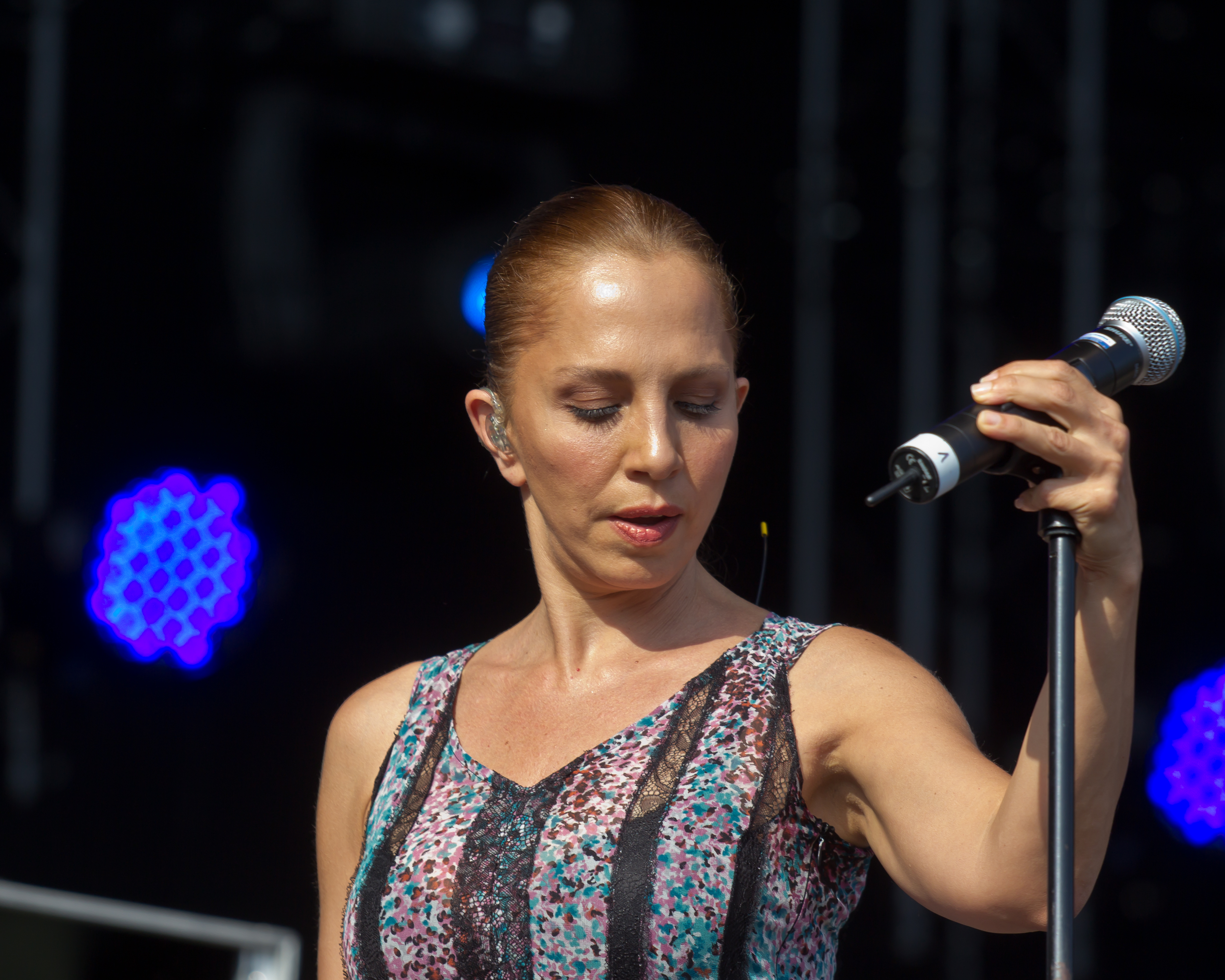 Birlikte - Kundgebung - Sertab Erener und Demir Demirkan Foto: Sertab Erener